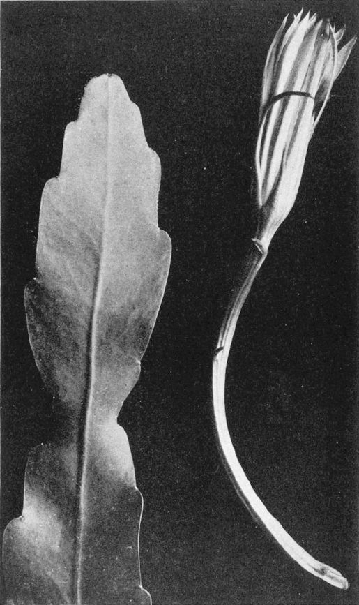 Epiphyllum hookeri ssp. guatemalense (Hylocereeae; Cactaceae; Planta) Nathaniel Lord Britton és Joseph Nelson Rose "The Cactaceae" c. könyvéből (Epiphyllum guatemalense néven)